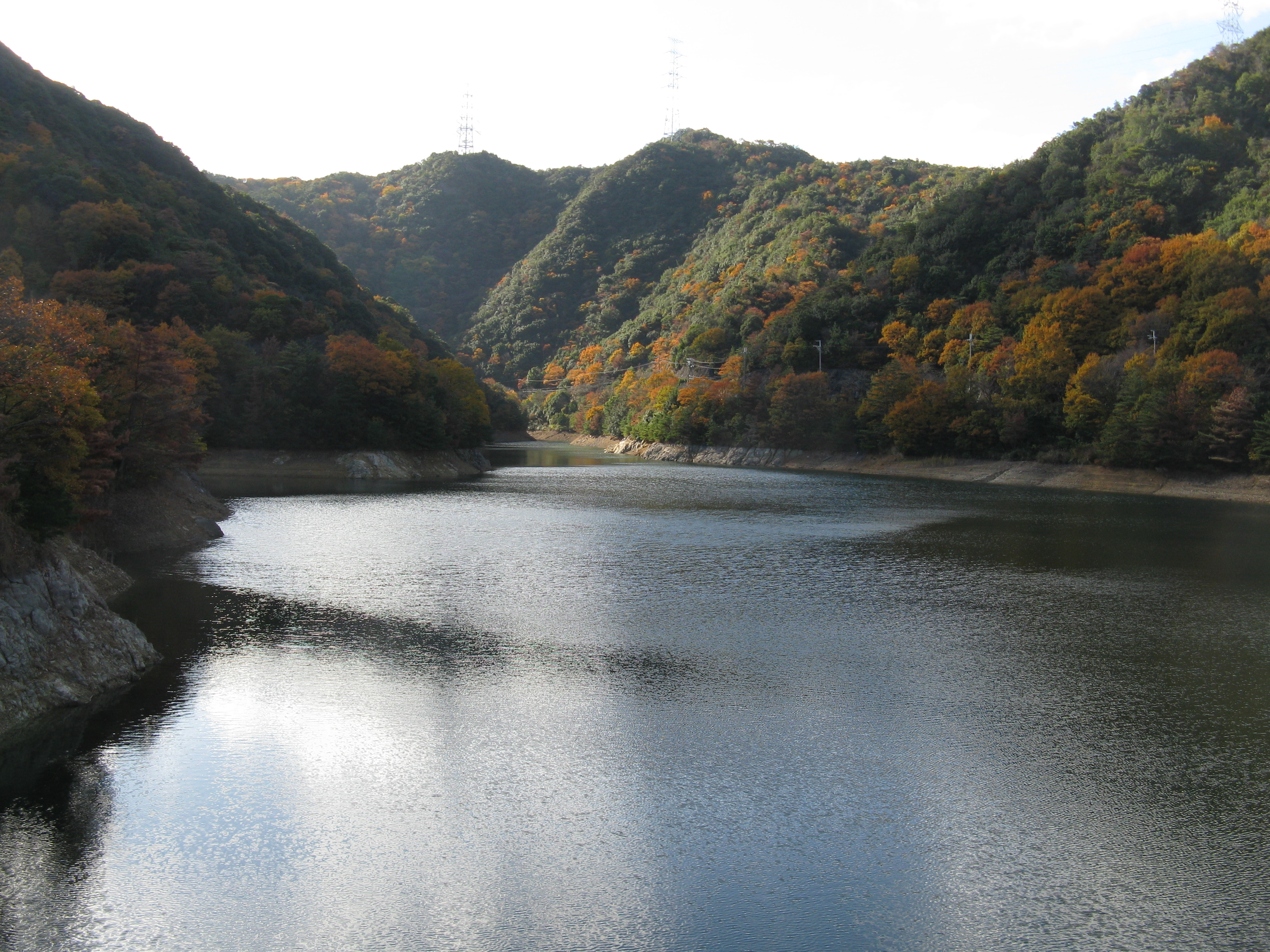 永楽ダム